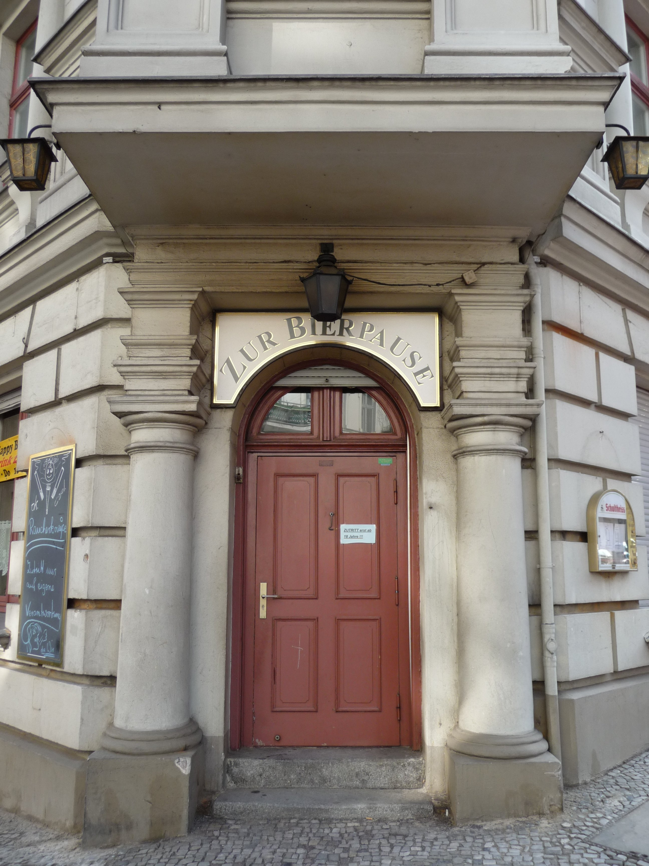 Kneipe „Zur Bierpause“ in Berlin-Kreuzberg, Willibald-Alexis-Strasse 31; Fassadenkulisse für die Filmkneipe „Zur Funzel“ in der deutschen Fernsehverfilmung „Ein Mann will nach oben“ von 1978